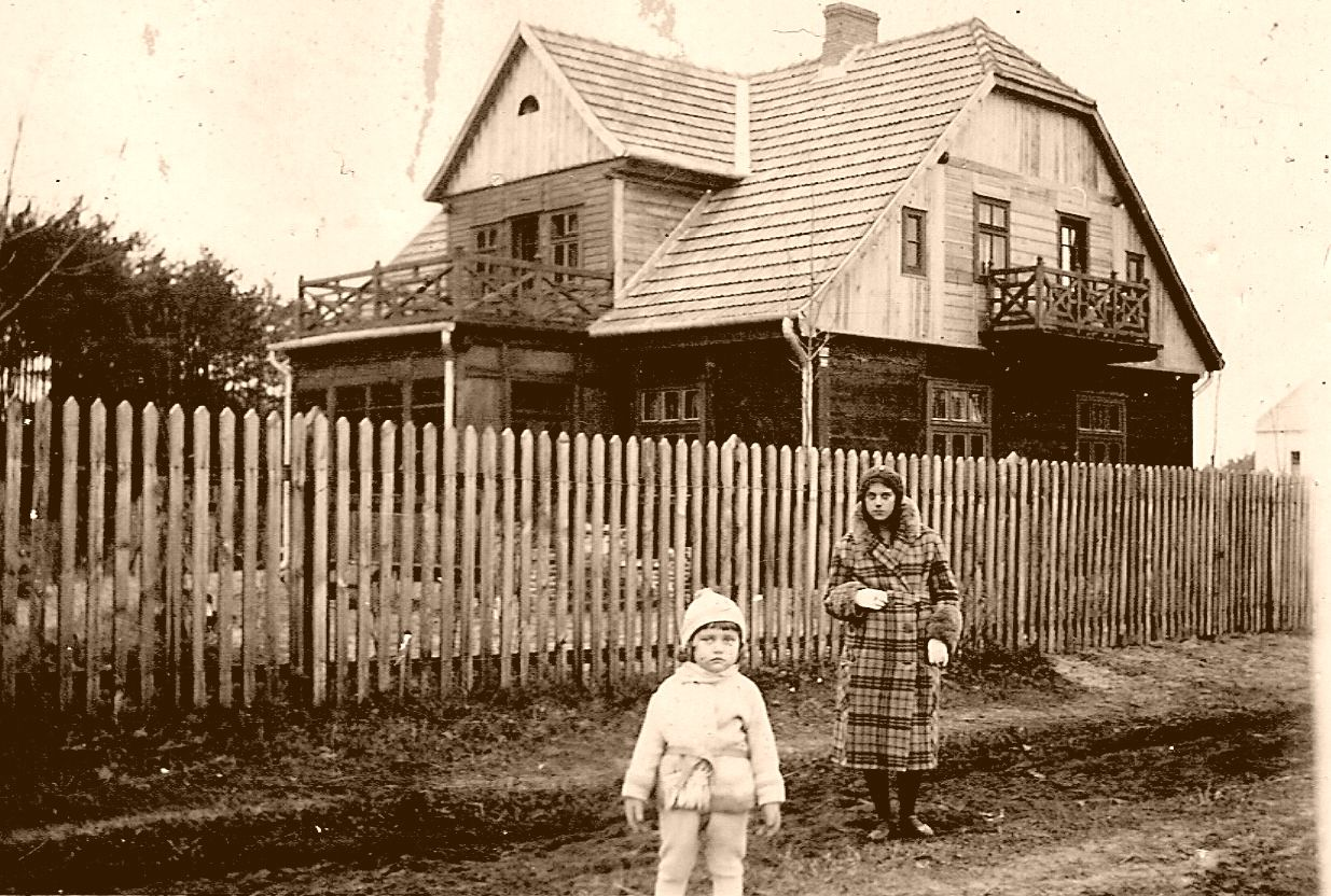 mój dom rodzinny w Otłoczynie Jacek Krzyżyński